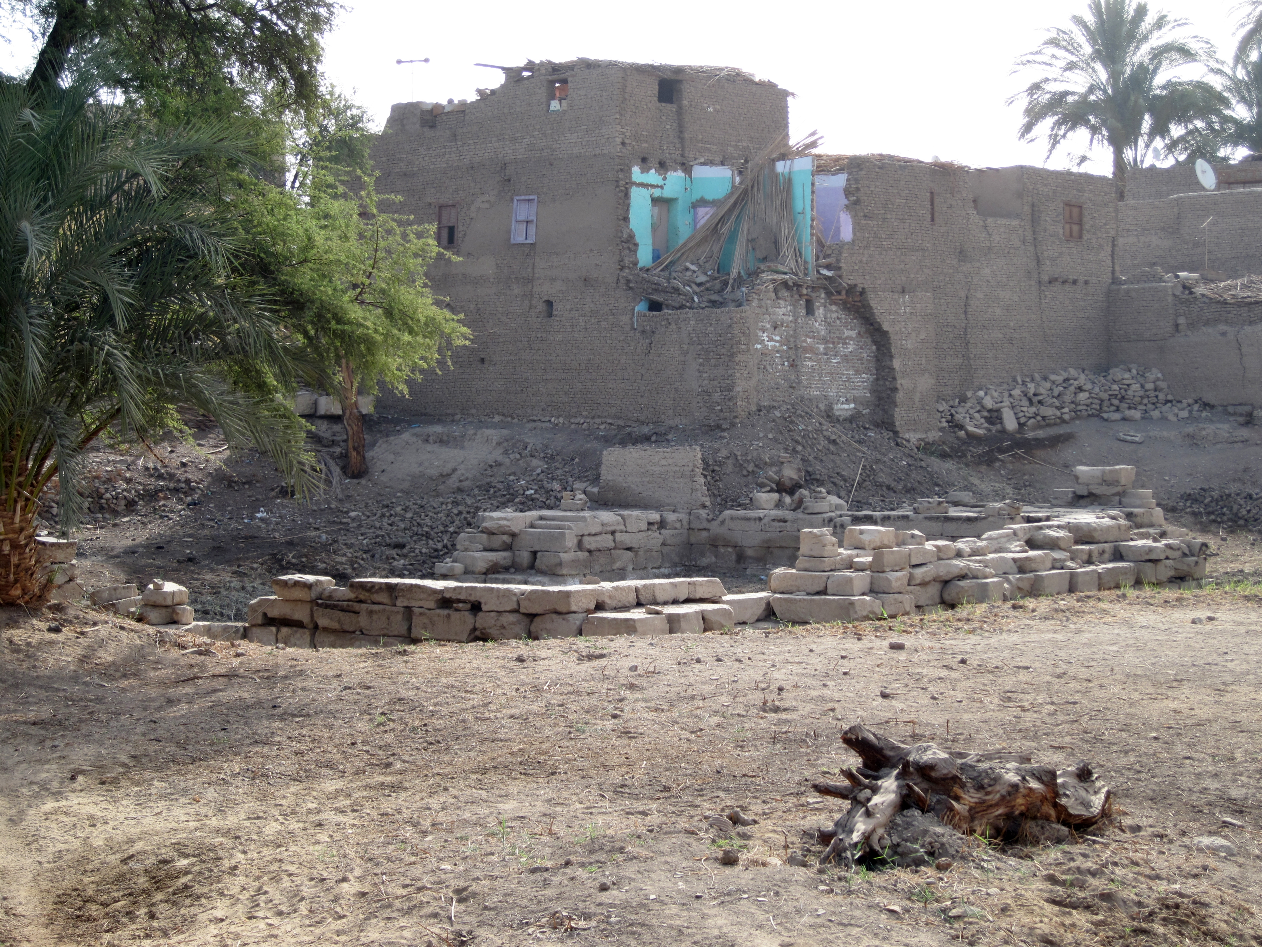 Nebenanlage des Month-Tempels von el-Tod, Ägypten